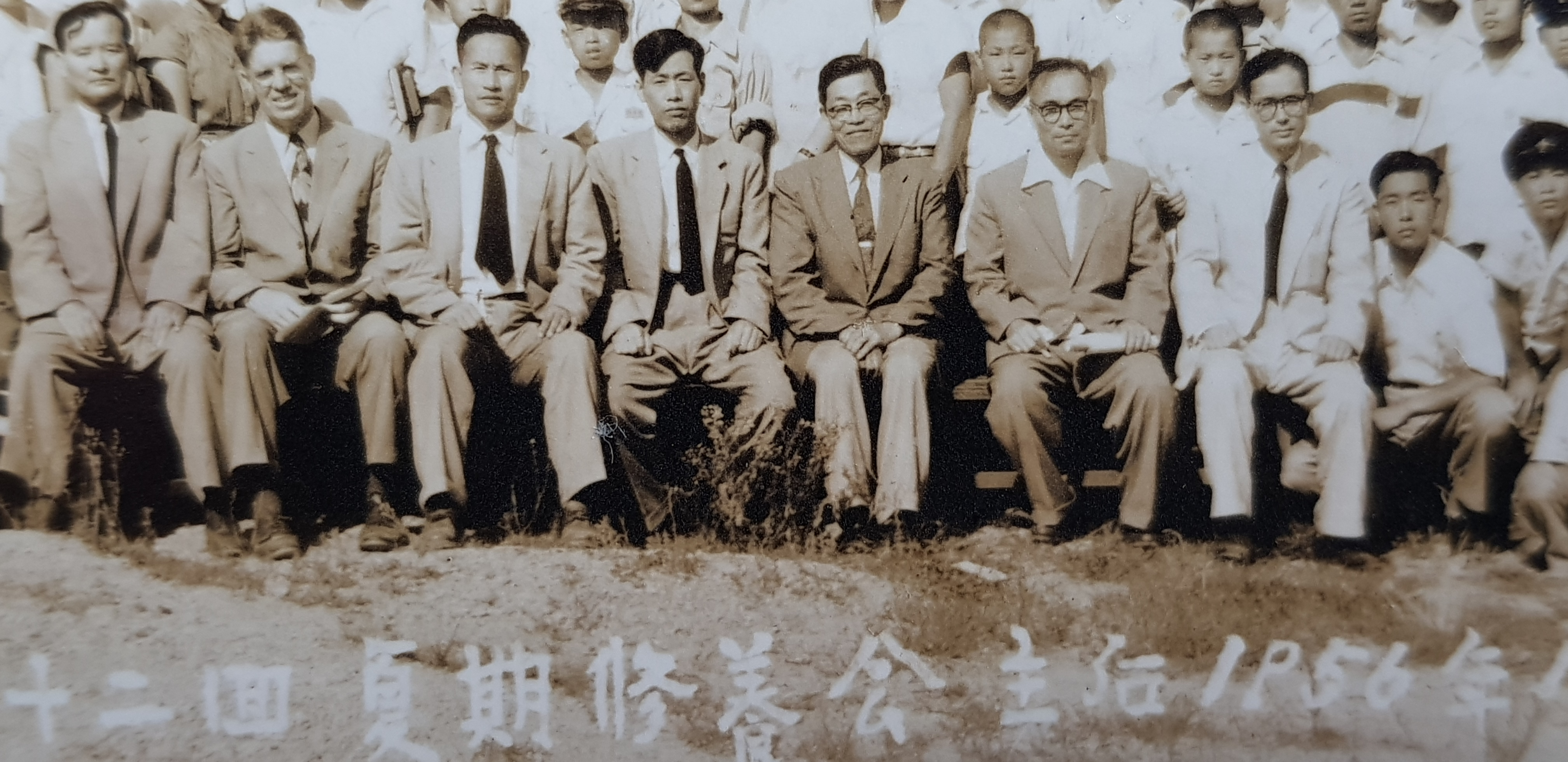 고려신학교 교수들, 좌측에서 두번째 한부선 선교사, 1956년